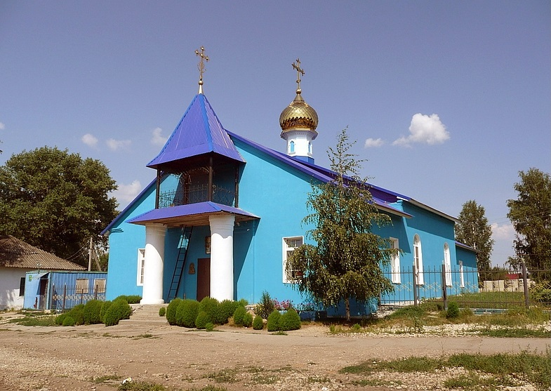 2007 год.